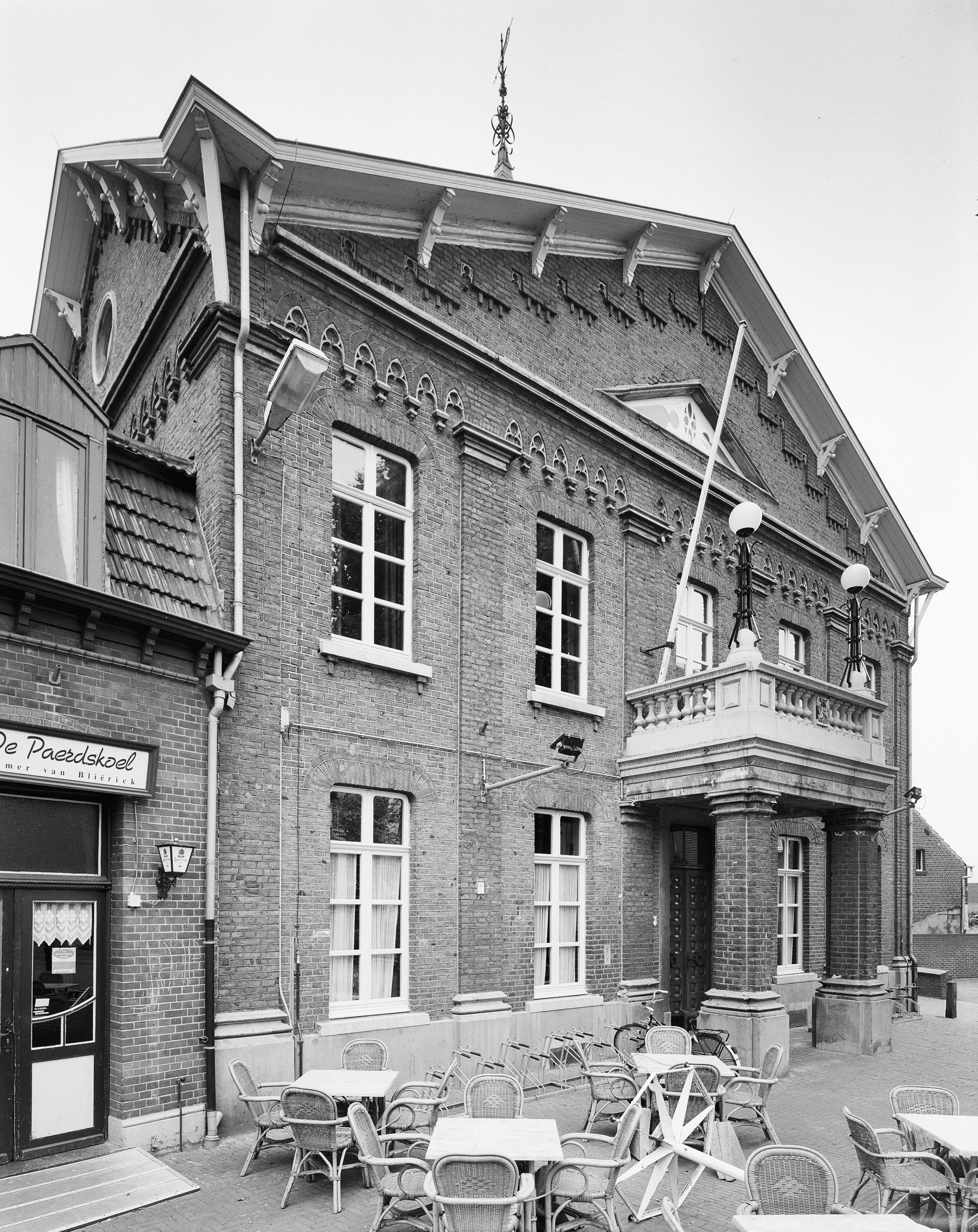 voormalig raadhuis Blerick: Overzicht voorgevel (opmerking: Gefotografeerd voor Monumenten In Nederland Limburg)